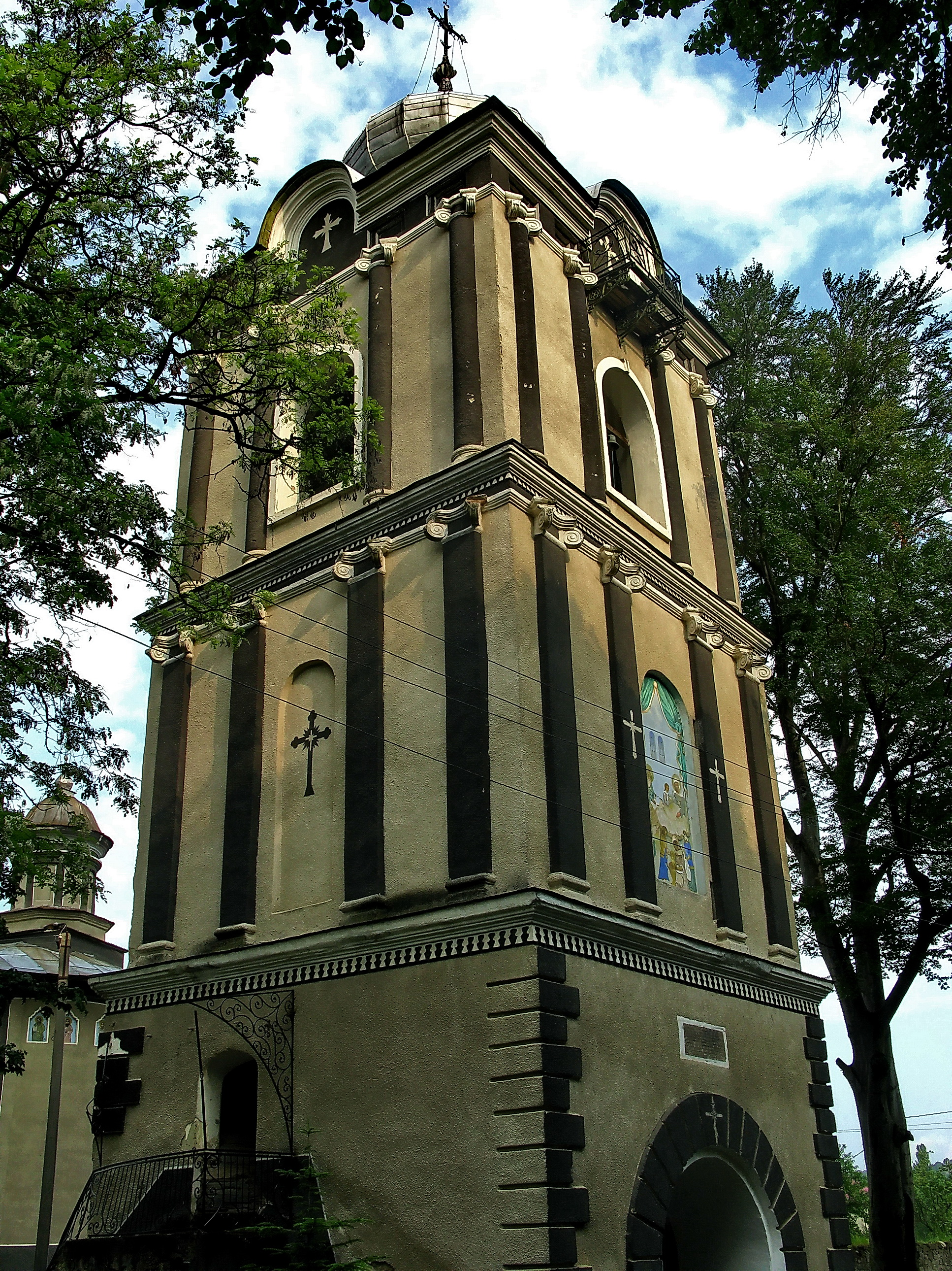 Clopotnița bisericii „Nașterea Maicii Domnului” din Mogoșești, raionul Herța, regiunea Cernăuți, Ucraina